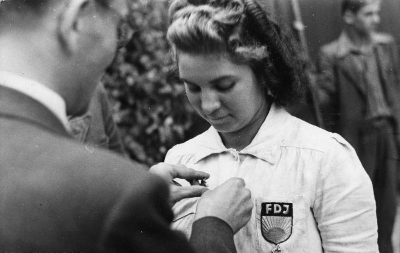 Kirchmöser, Auszeichnung einer Aktivistin Walzwerk - Kirchmöser Auszeichnung der ersten Aktivistin des Walzwerkes durch Hauptdirektor der VESTA - Leipzig Grabner. Illus/Gabriel 15.9.49 3974-49